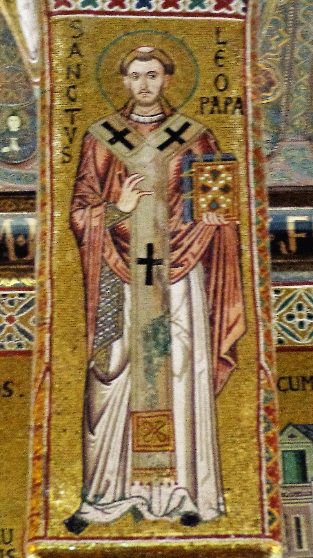 San Leone Papa.